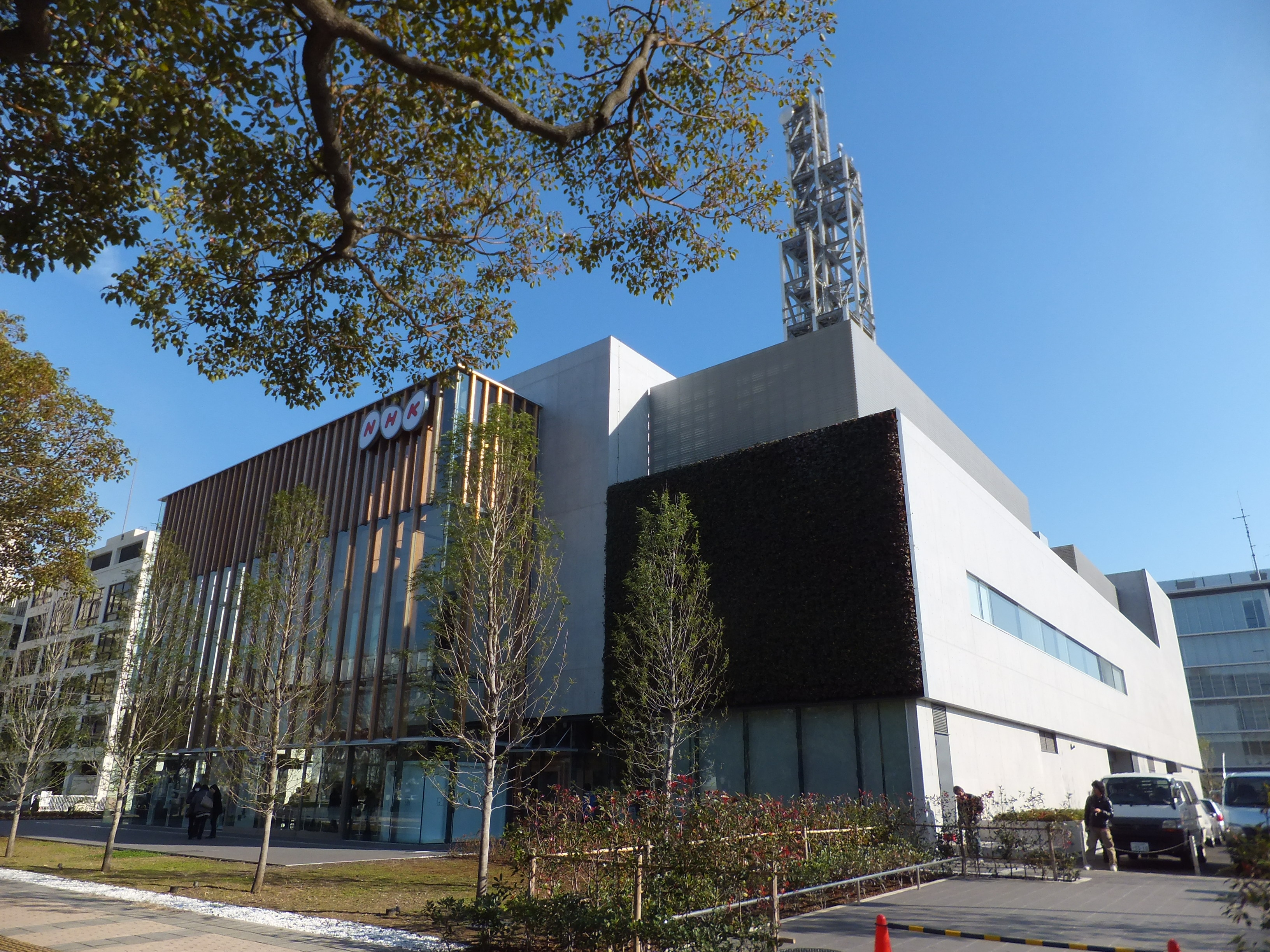 2011年12月5日から業務を開始、12月10日から公開された新しいNHK千葉放送会館